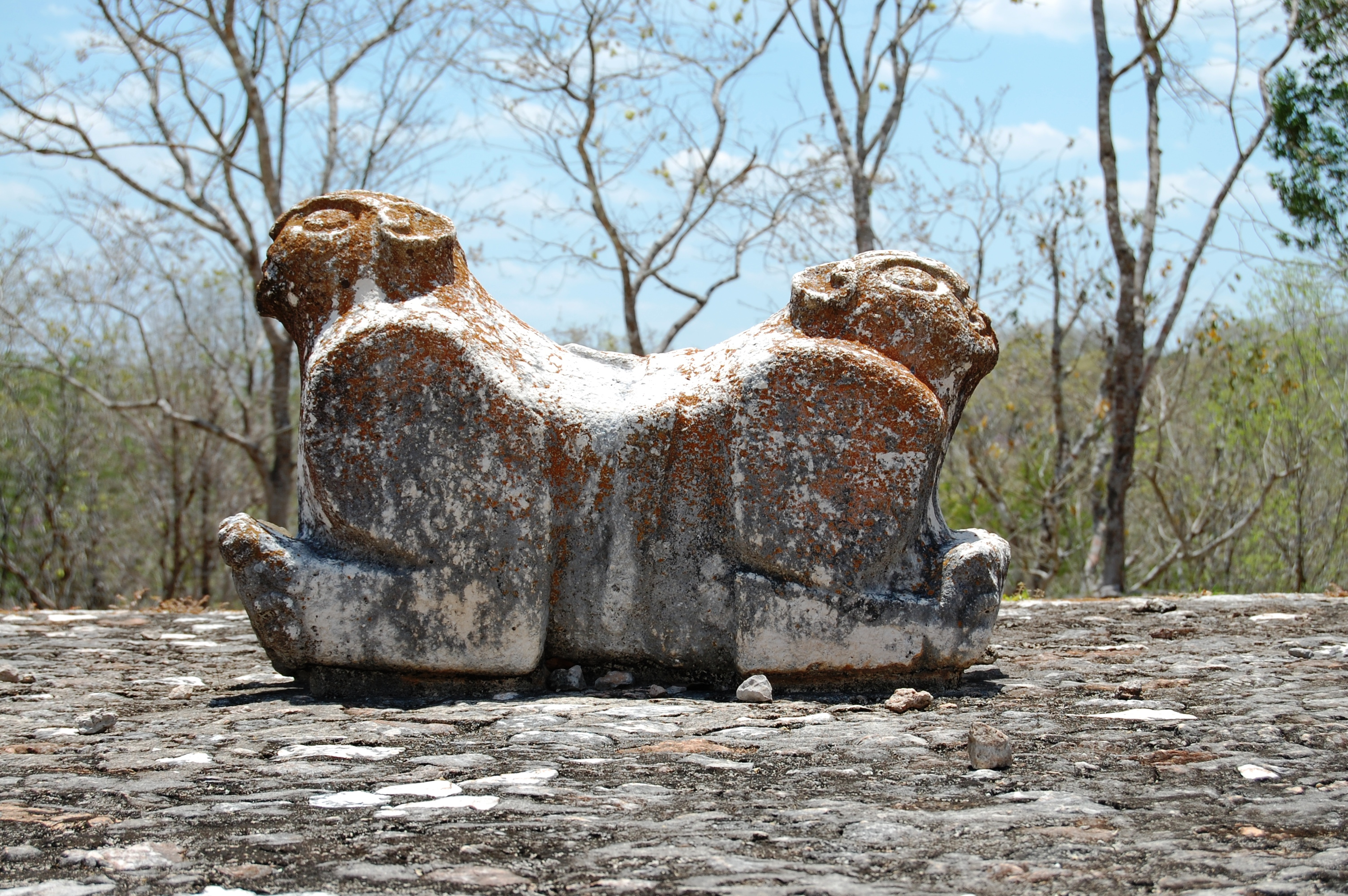 Uxmal, Mexico Palacio del Gobernador: Jaguar throne.